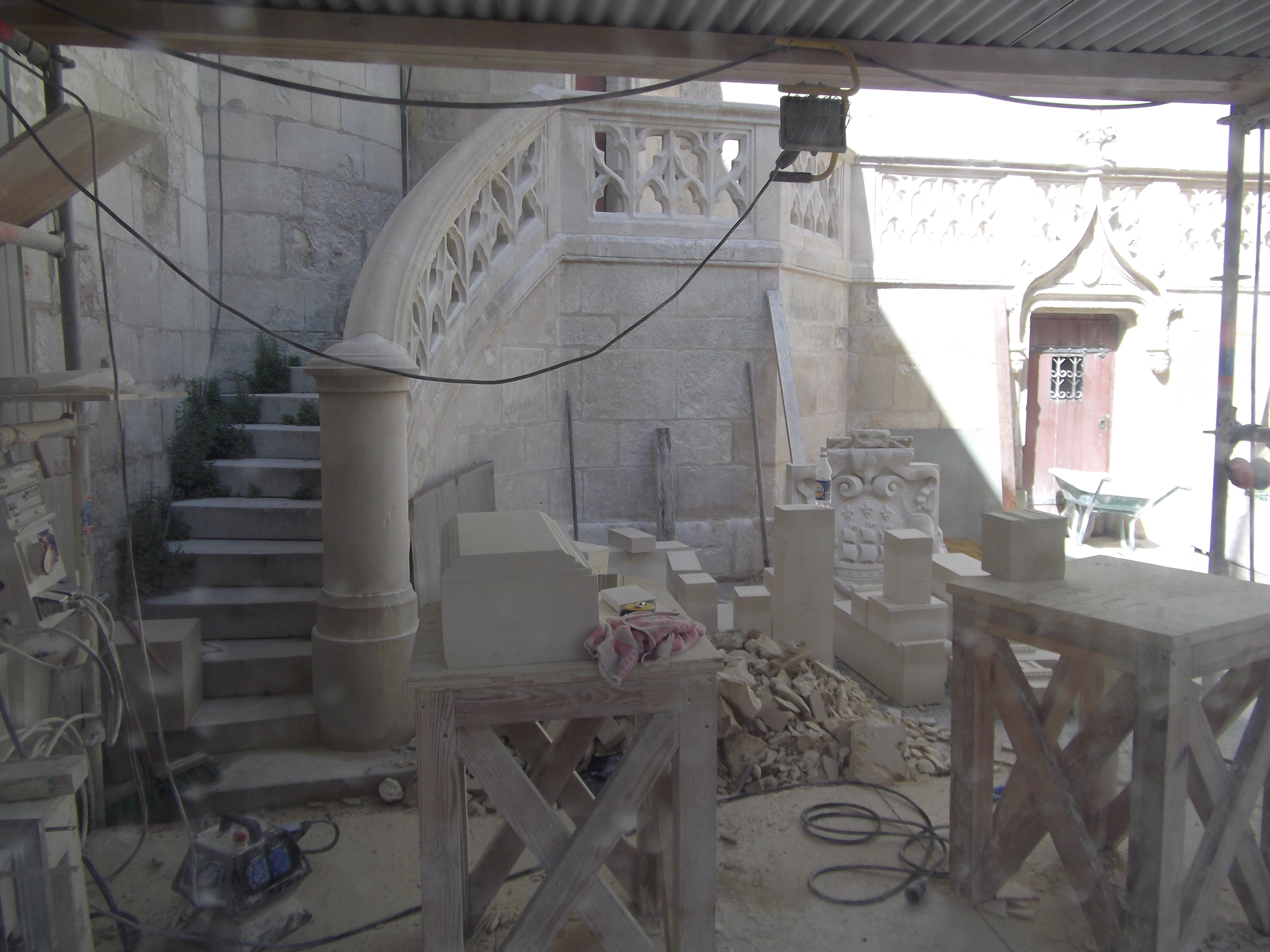 Travaux de restauration de l'hôtel de ville de 2010 à 2013 .